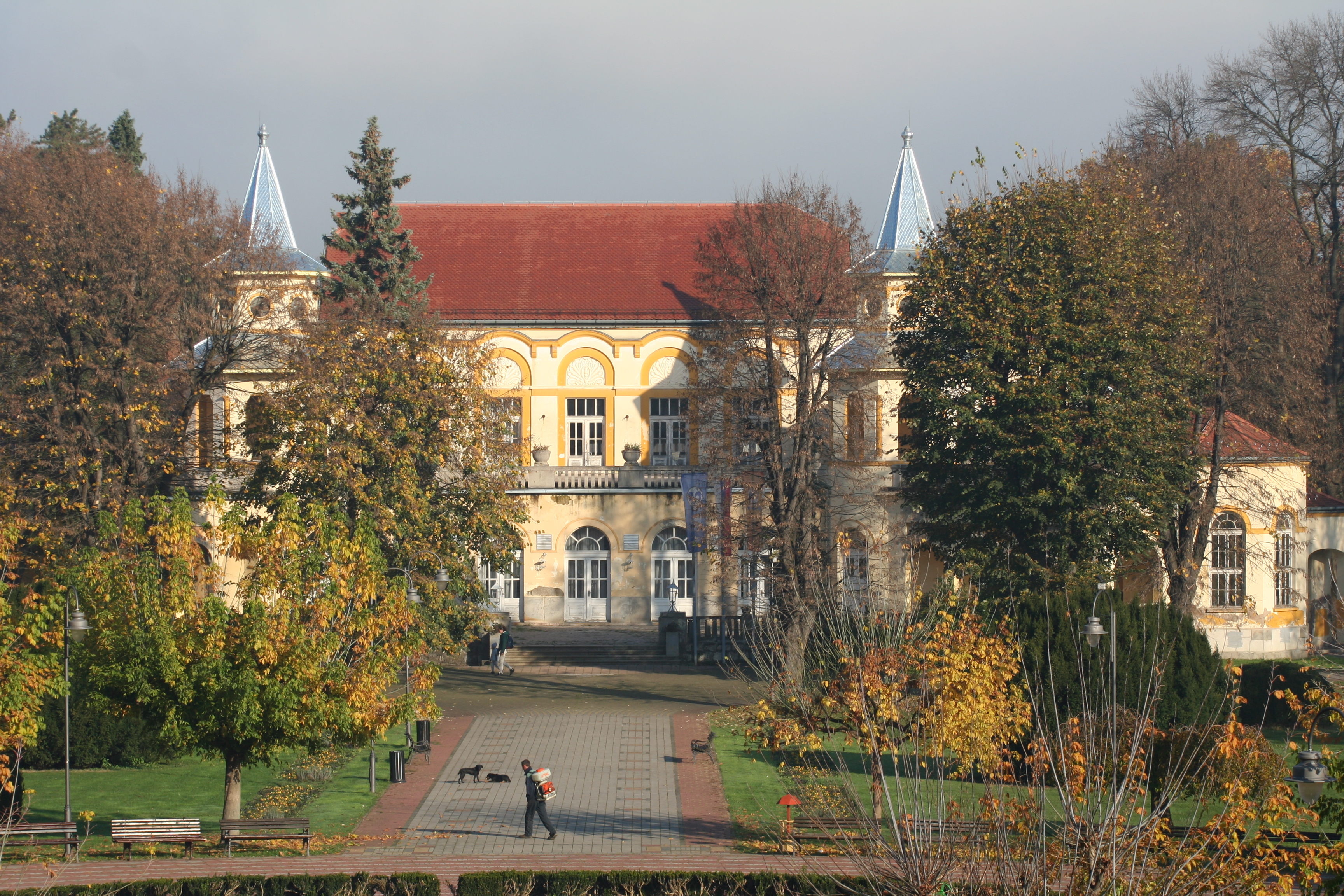 Kursalon, Banja Koviljača